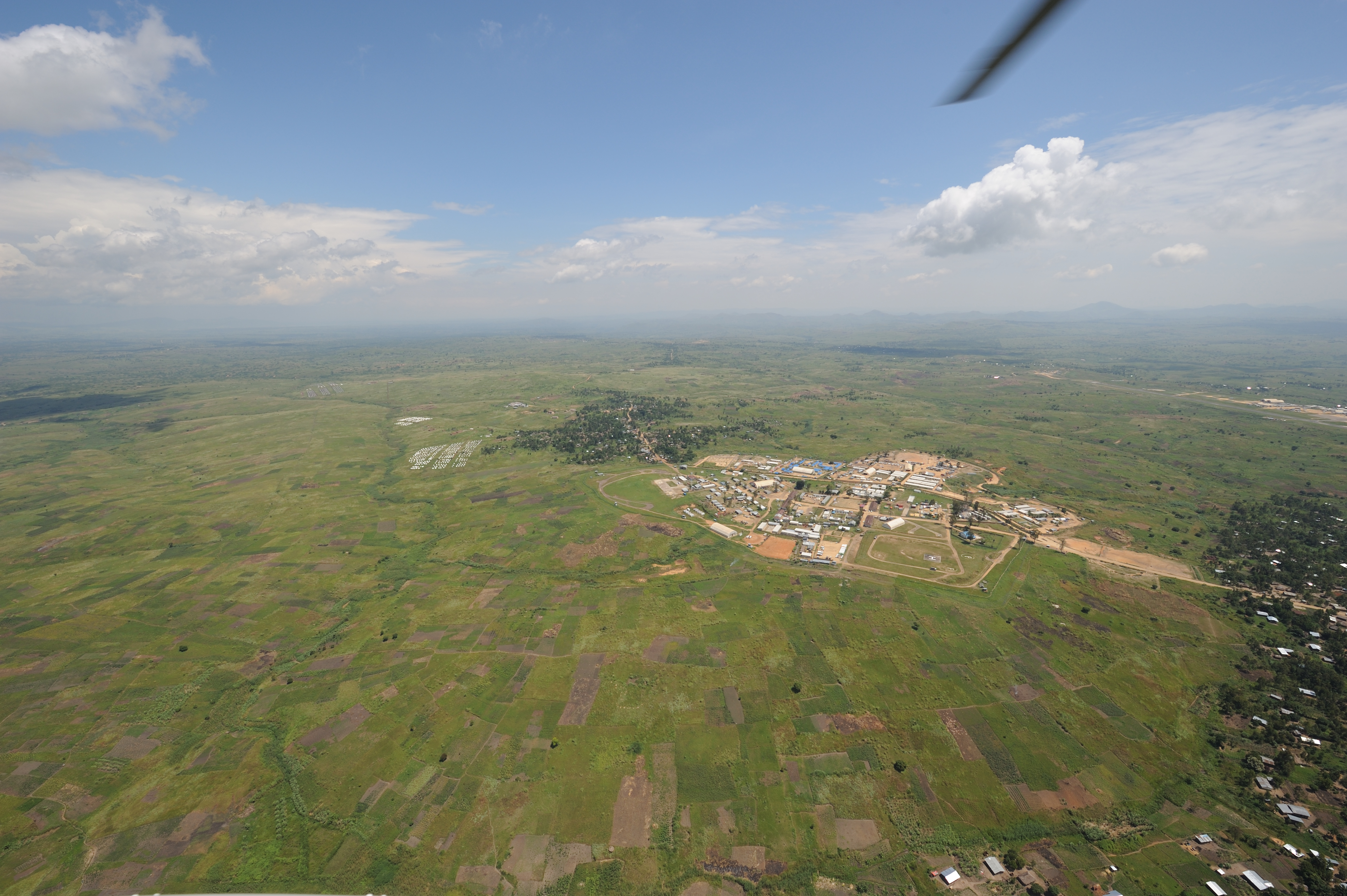 vue aérienne de la base de la MONUC [ancienne base]. Au fond à droite, l'aéroport de Bunia.